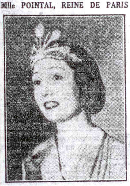 Portrait d'Henriette Pointal, Reine de Paris de la Mi-Carême 1933.